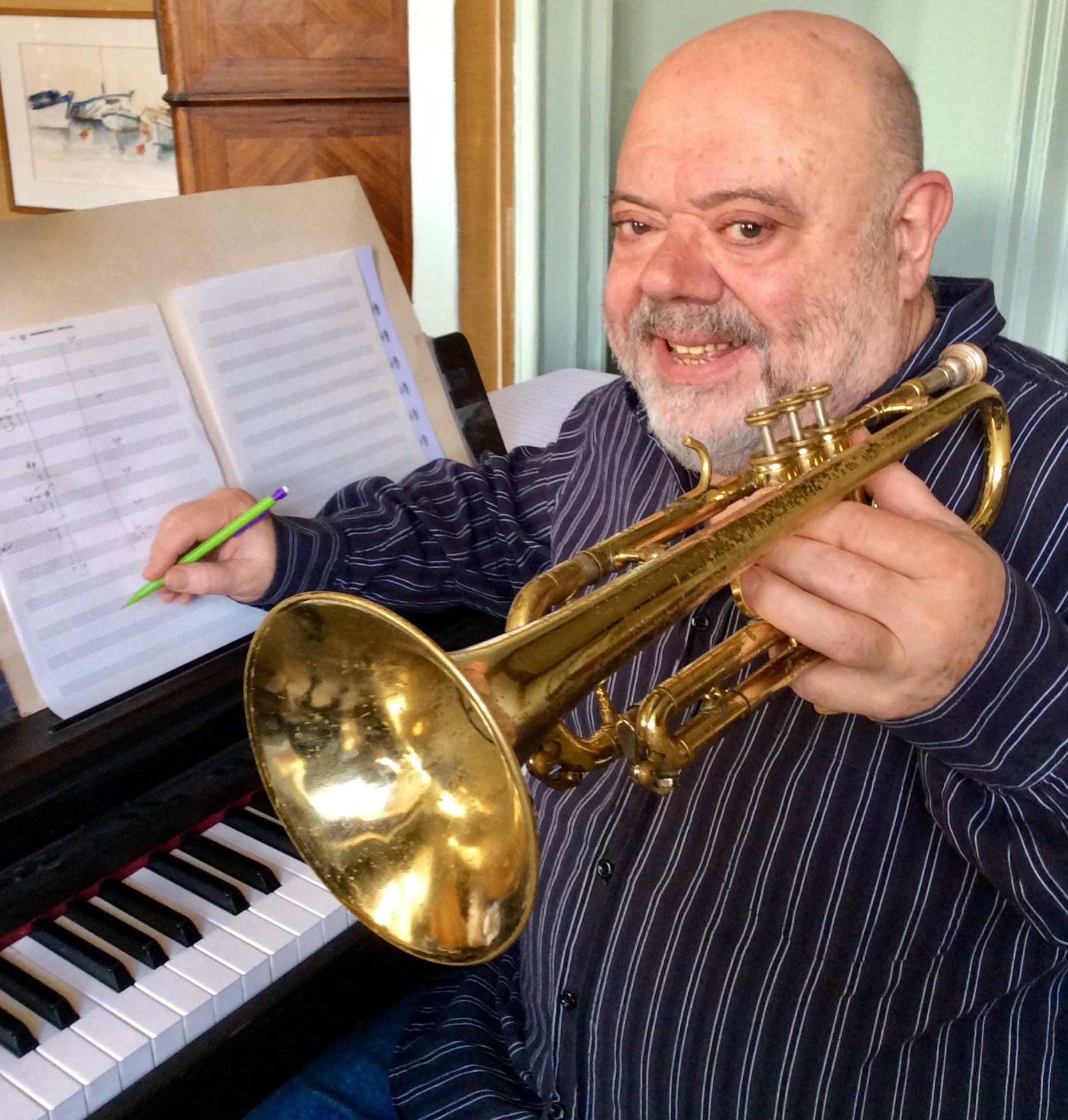 Portrait de Jean Loup LONGON